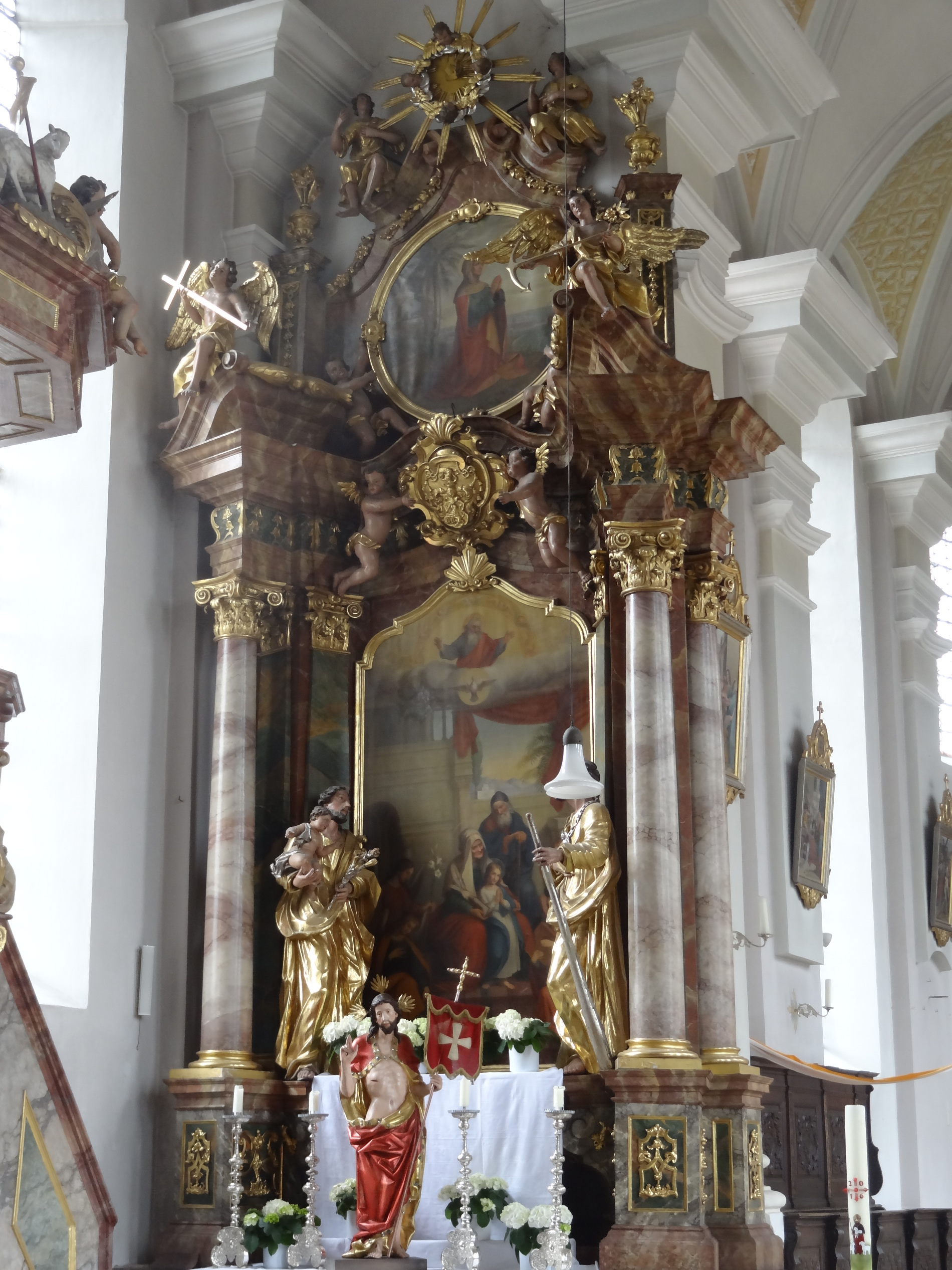 Linker Seitenaltar der kath. Pfarrkirche Mariä Geburt im Markt Wartenberg (Landkreis Erding, Oberbayern)